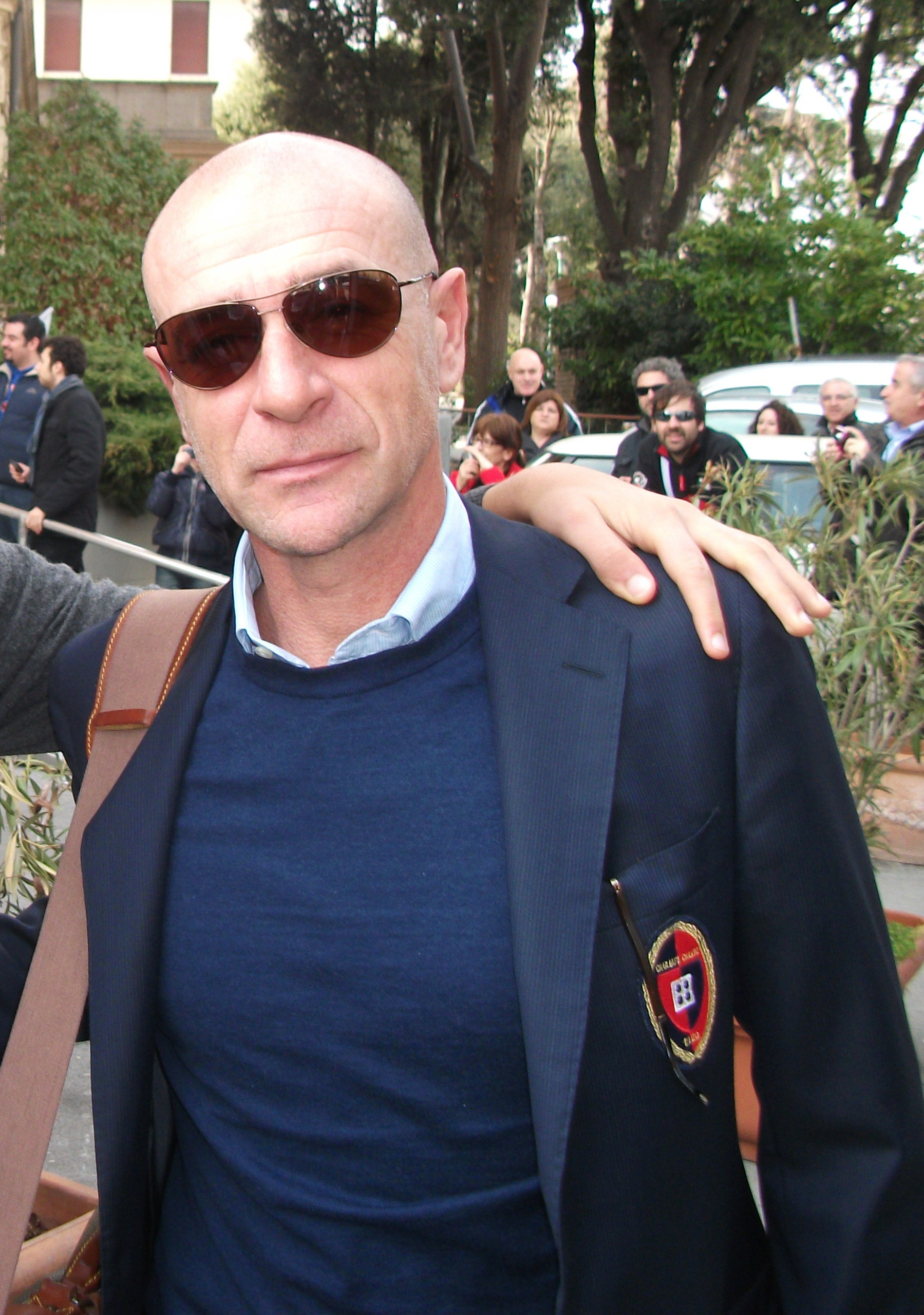 Davide Ballardini, allenatore del Cagliari, prima della partita di Serie A, Siena - Cagliari del 4 marzo 2012.